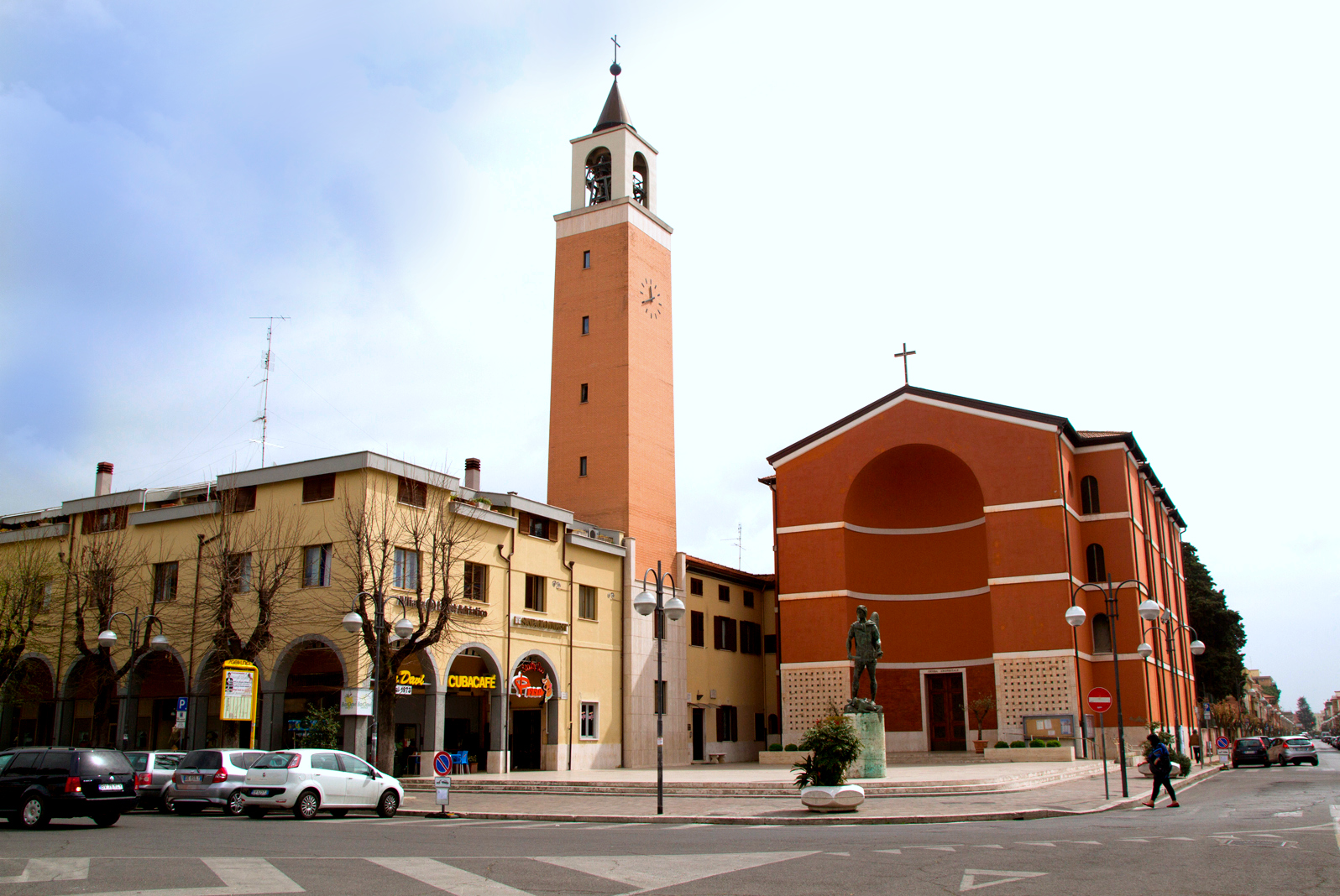 Chiesa San Michele Arcangelo, Aprilia LT, Lazio, Italy